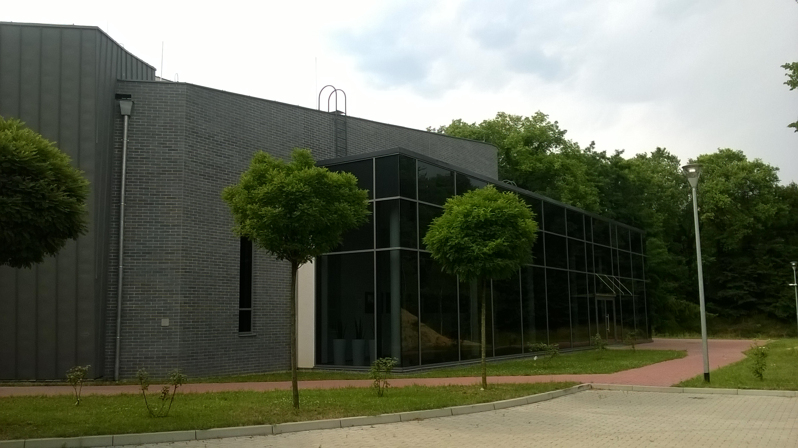 Wydz.Elektr.ZUT-ul.26-kwietnia-nr10